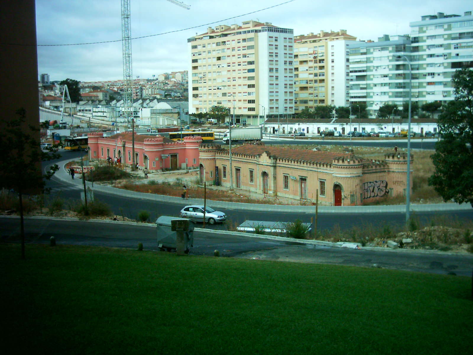 Obras da CRIL nas Portas de Benfica. Camera: DSCimg Cameras License on Flickr (2011-01-31): CC-BY-SA-2.0